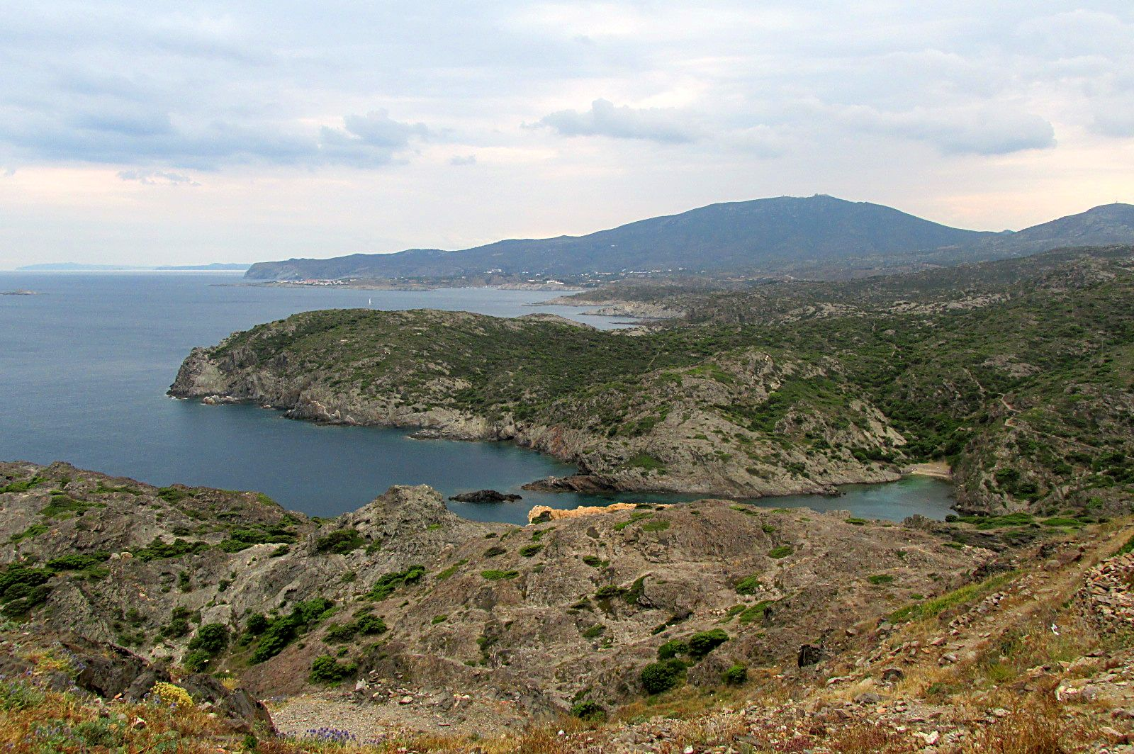 Cabo de Creus desde el faro, mirando hacia el sur This is a photography of a Special Area of Conservation in Spain with the ID: ES5120007. Natura2000 entry, EEA entry